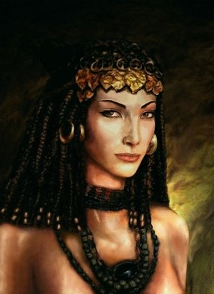 Esta es una imagen de la Bruja Ancestral, que vivio en el templo de Isis, se desconoce la epoca exacta mas Cleopatra aseguro conocerla.